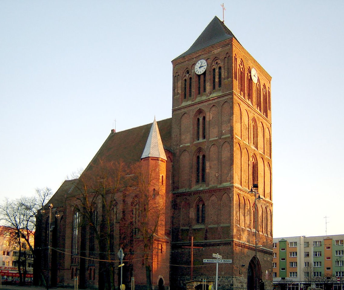 Sanktuarium Maryjne w Choszcznie